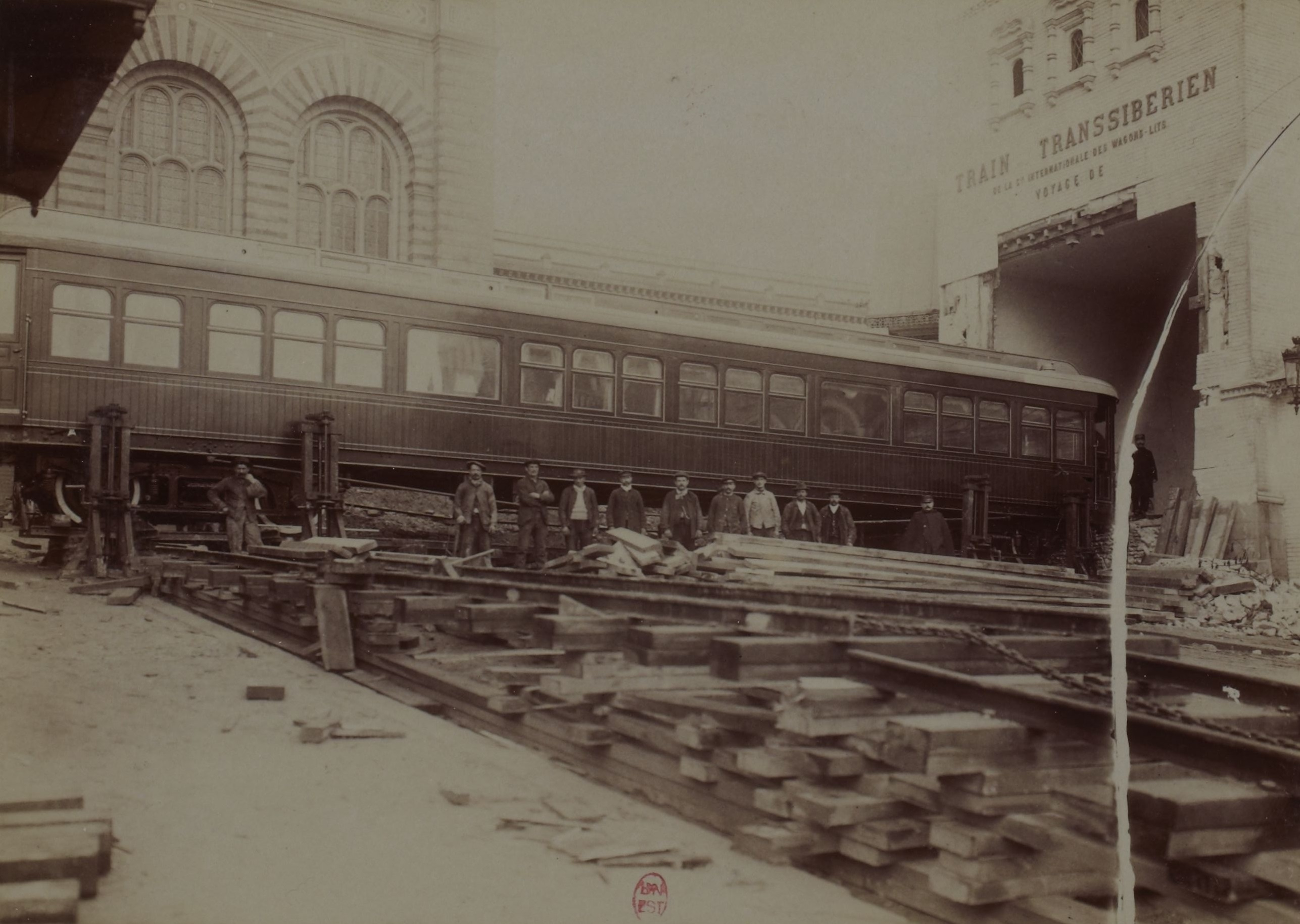 [Collection Jules Beau. Photographie sportive] : T. 12. Années 1899 et 1900 / Jules Beau : F. 46. Transsibérien, décembre 1900